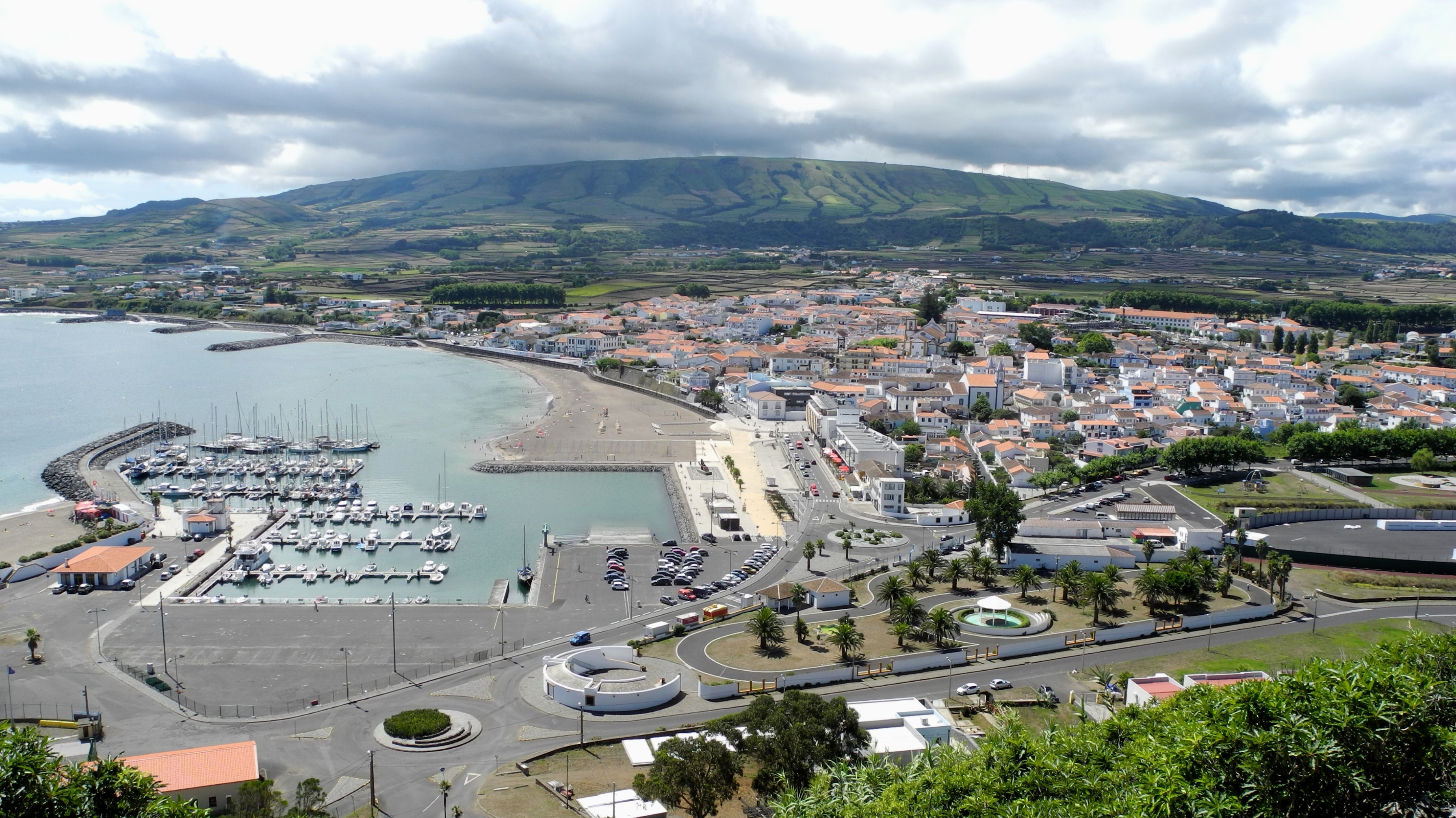 Praia da Vitória - Sicht von Süden über Stadt mit Hafen